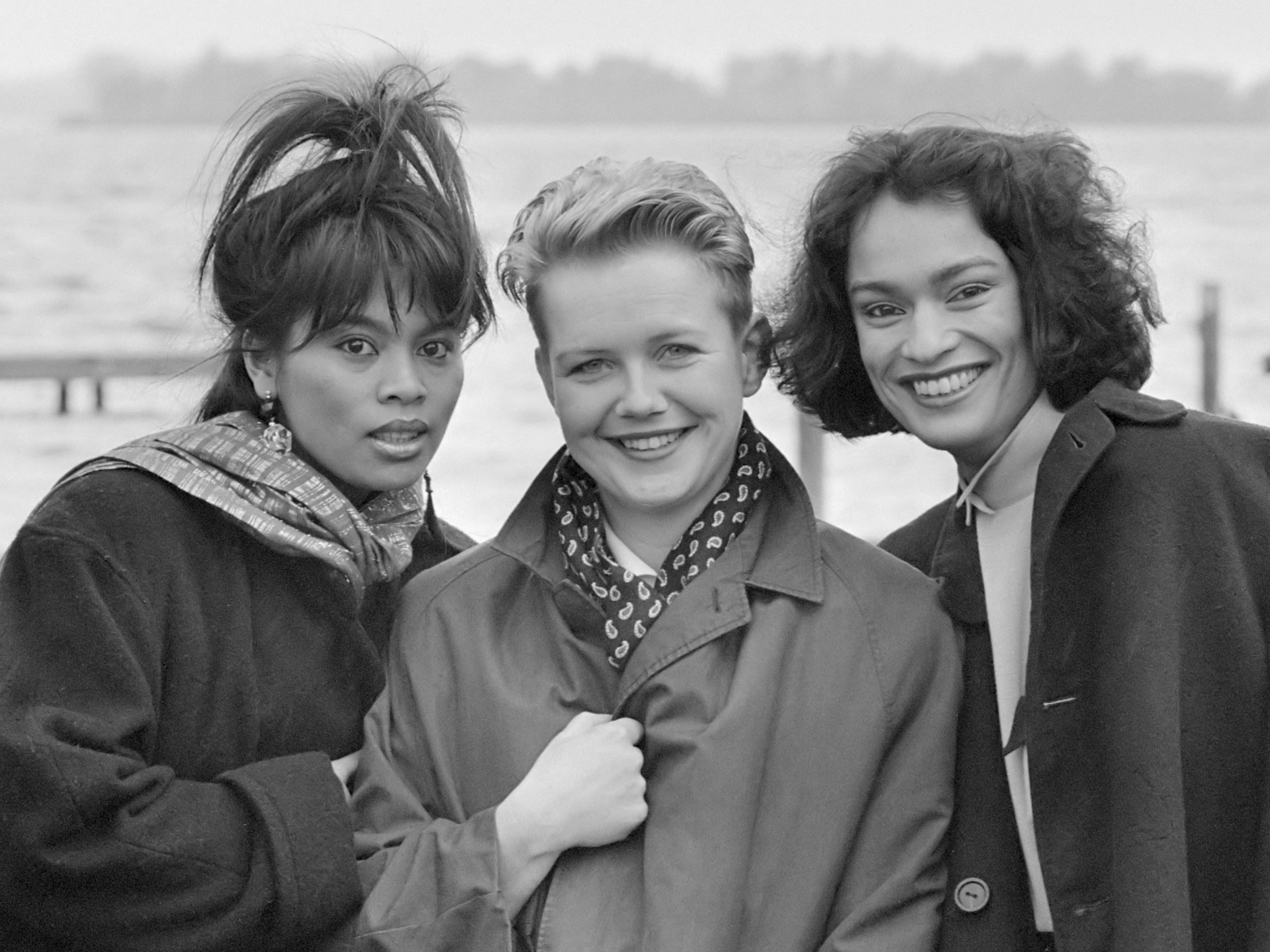 Knokke-ploeg van de VARA; v.l.n.r. Julya Lo'ko, Mathilde Santing, Astrid Seriese 29 maart 1985